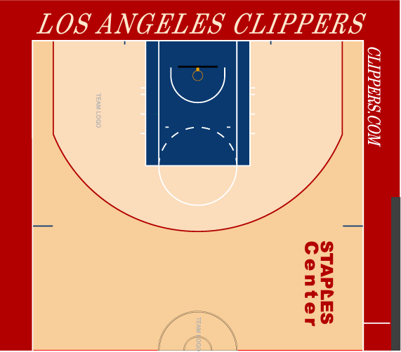 クッリパーズホームコート配色